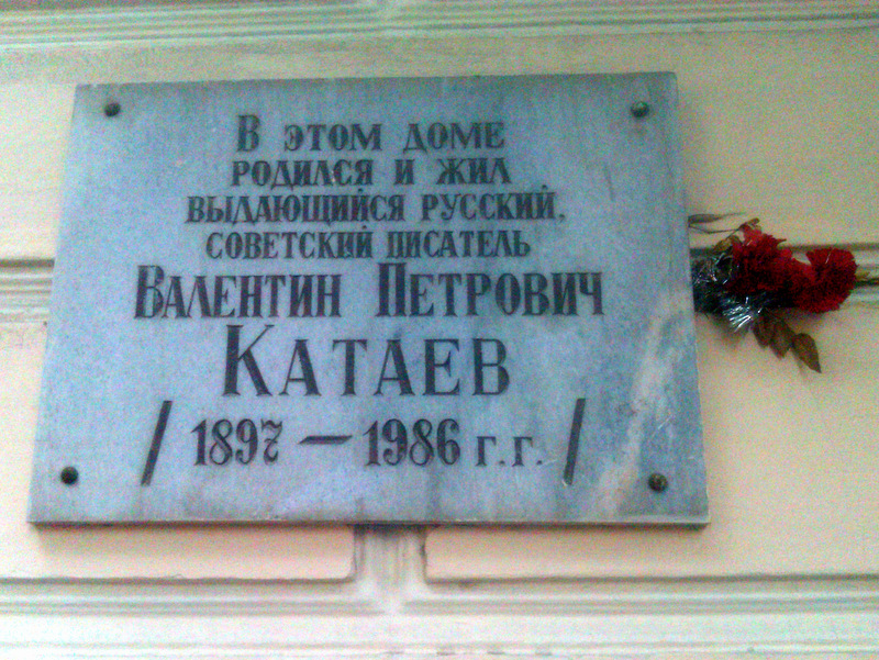 Пам'ятна дошка - В. Катаєв